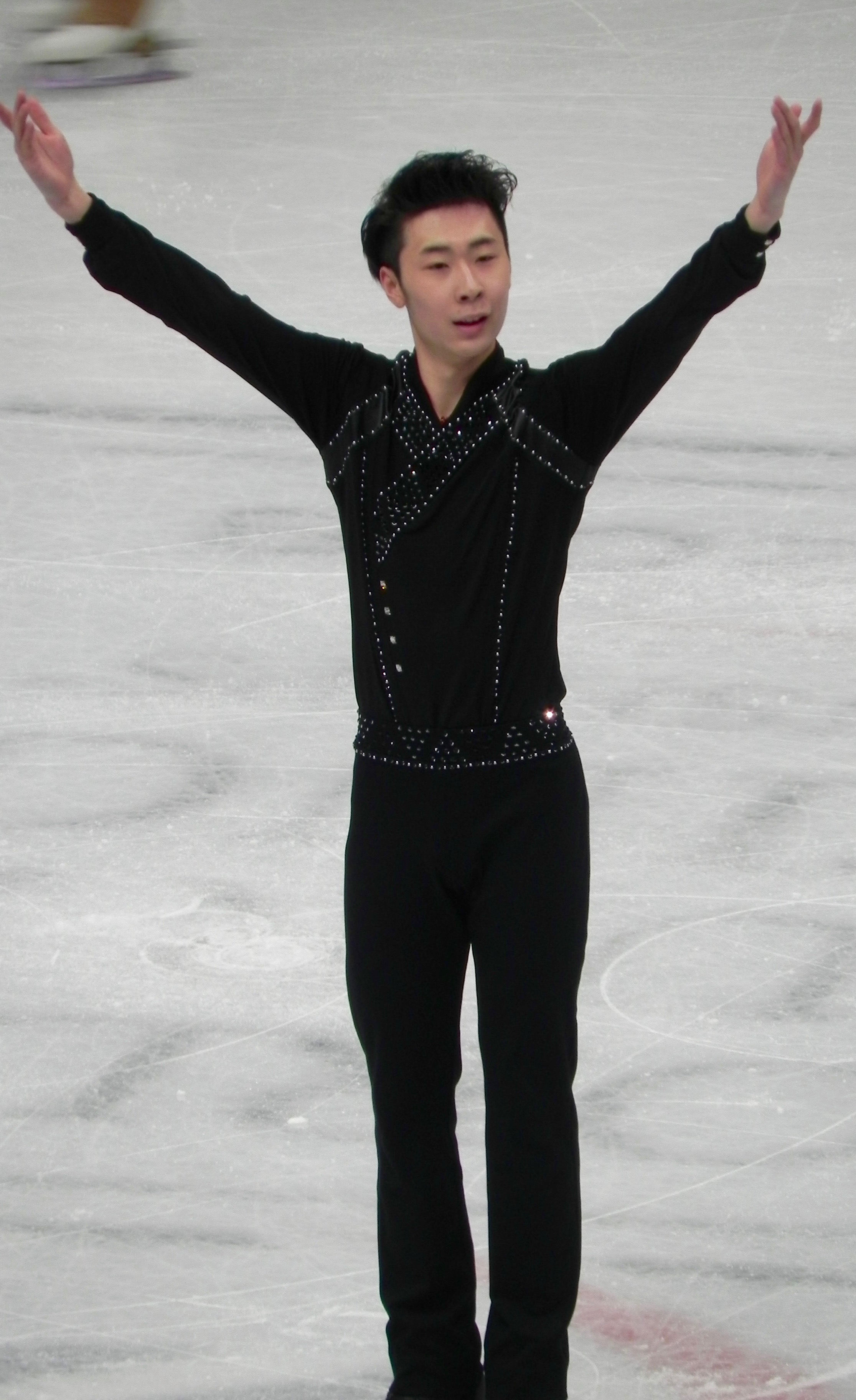 Boyang Jin ai campionati mondiali di pattinaggio di figura di Milano 2018.